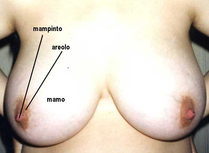 Mamo kun mampinto kaj areolo - memfotita 2006 gnu-kopirajto